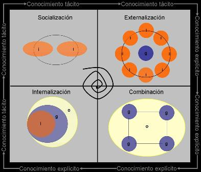 La conversión de conocimiento crea conocimiento nuevo, se genera una espiral